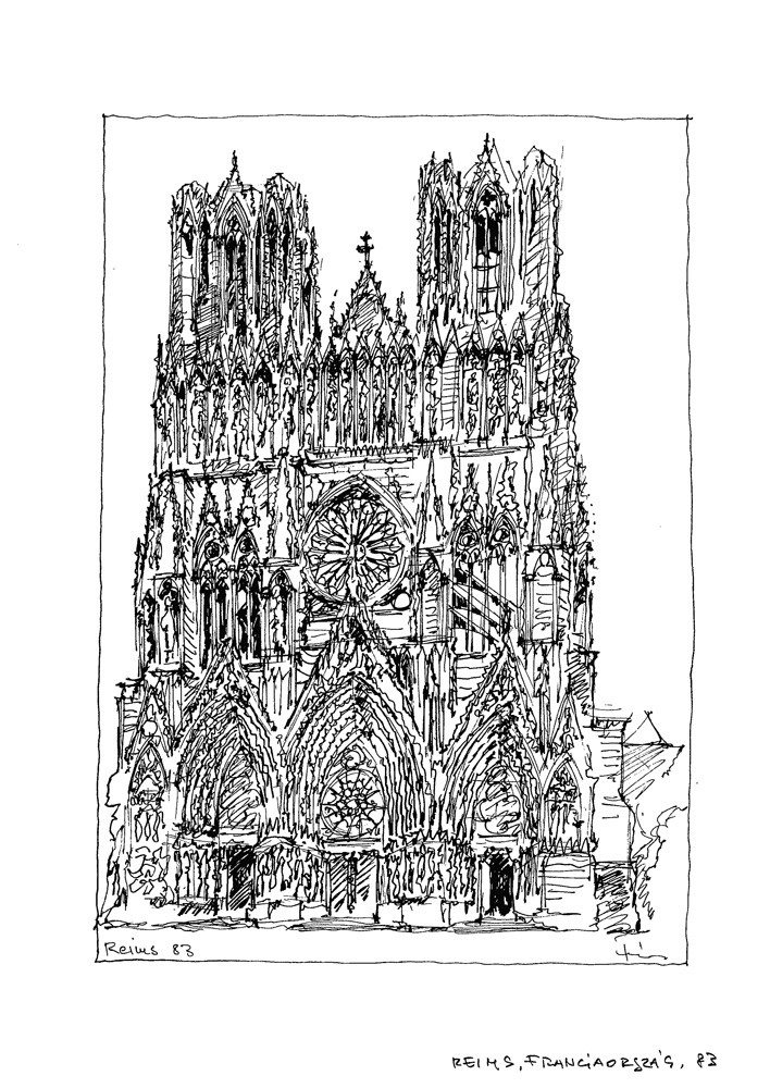 Reimsi katedrális, Franciaország (útirajz)